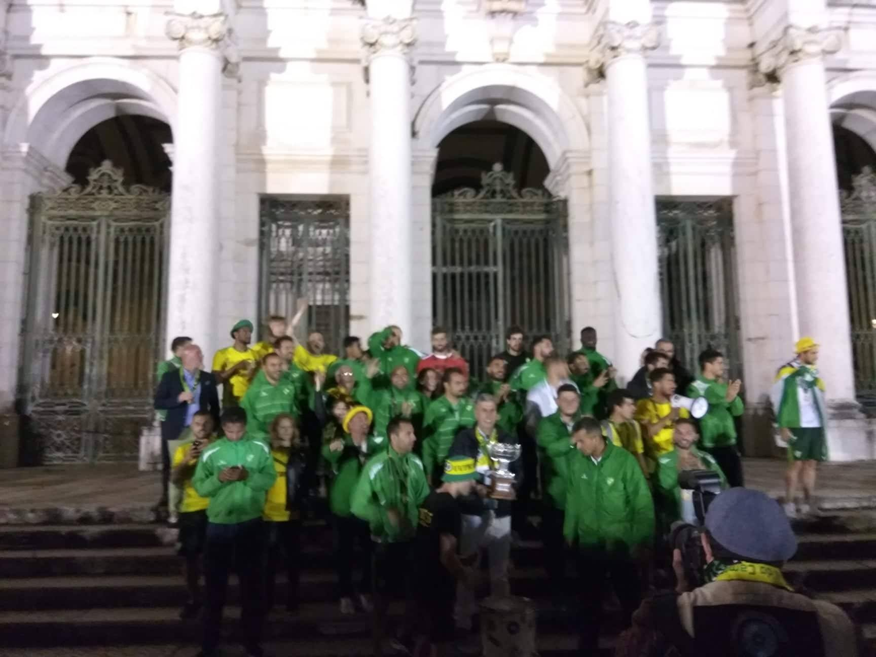 Festa do título do CD Mafra 2017/18, em Mafra frente ao Palácio Nacional a 10 de Junho de 2018.